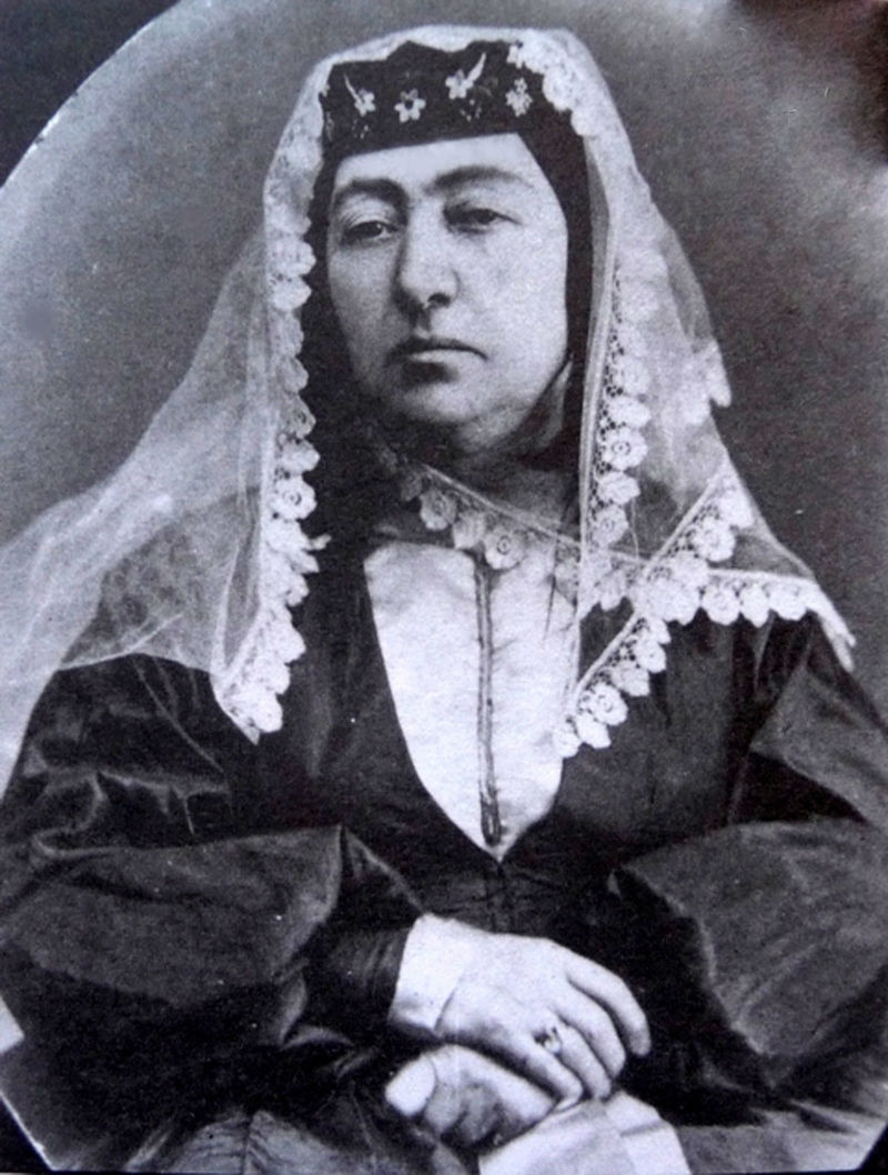 Мария Исаааковна Грузинская (1808—1882), дочь армянского сановника Саака Мелика-Агамаляна и жена Александра Багратиони.